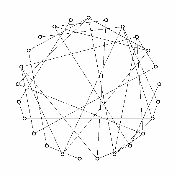 Erdős-Rényi model random graph